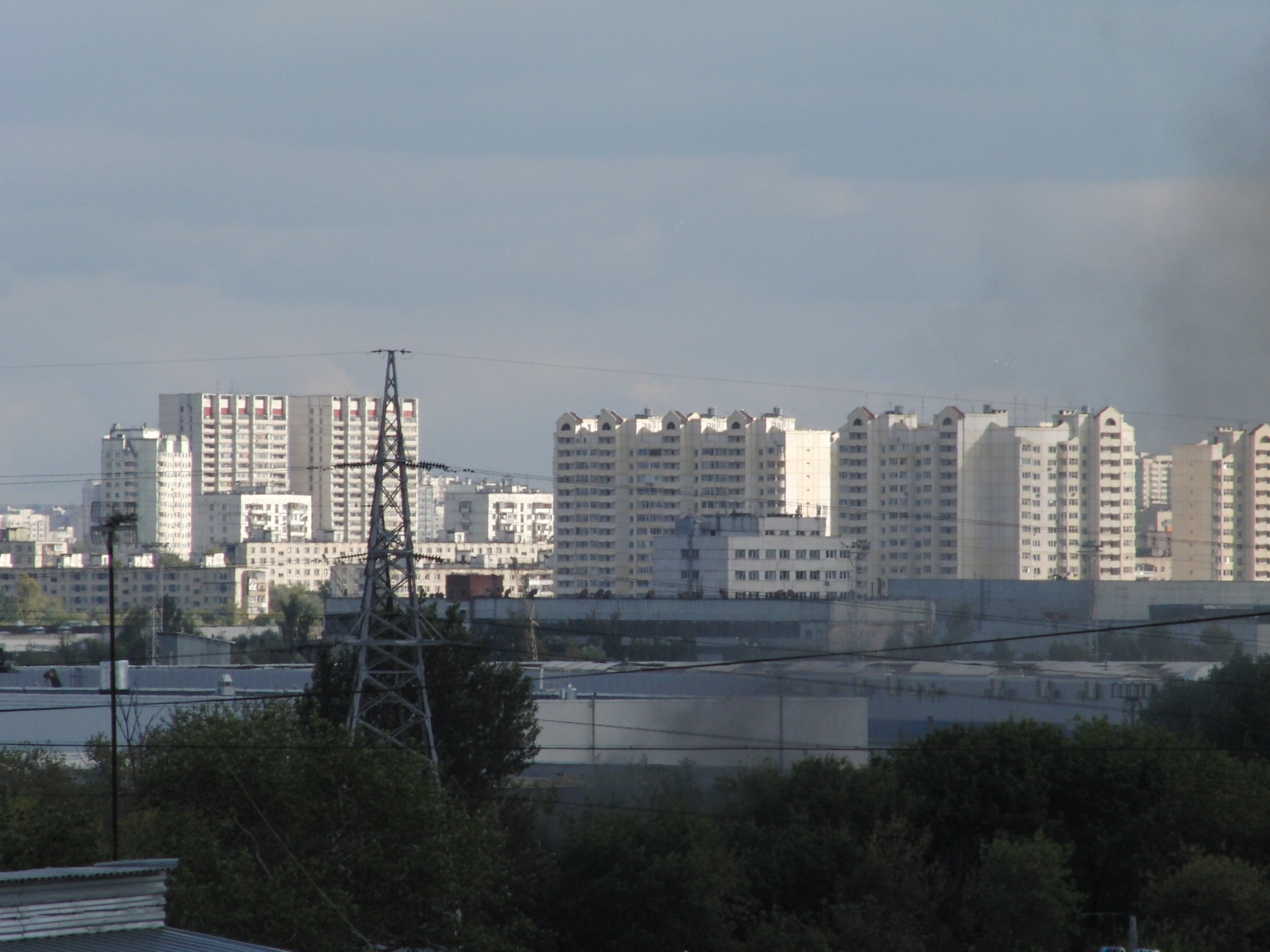 Pechatniki district